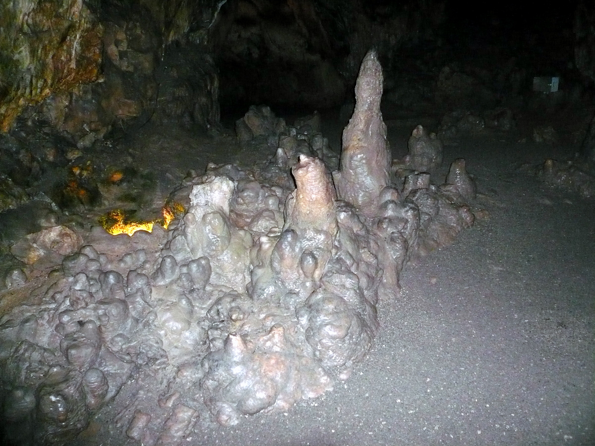 Charlottenhöhle